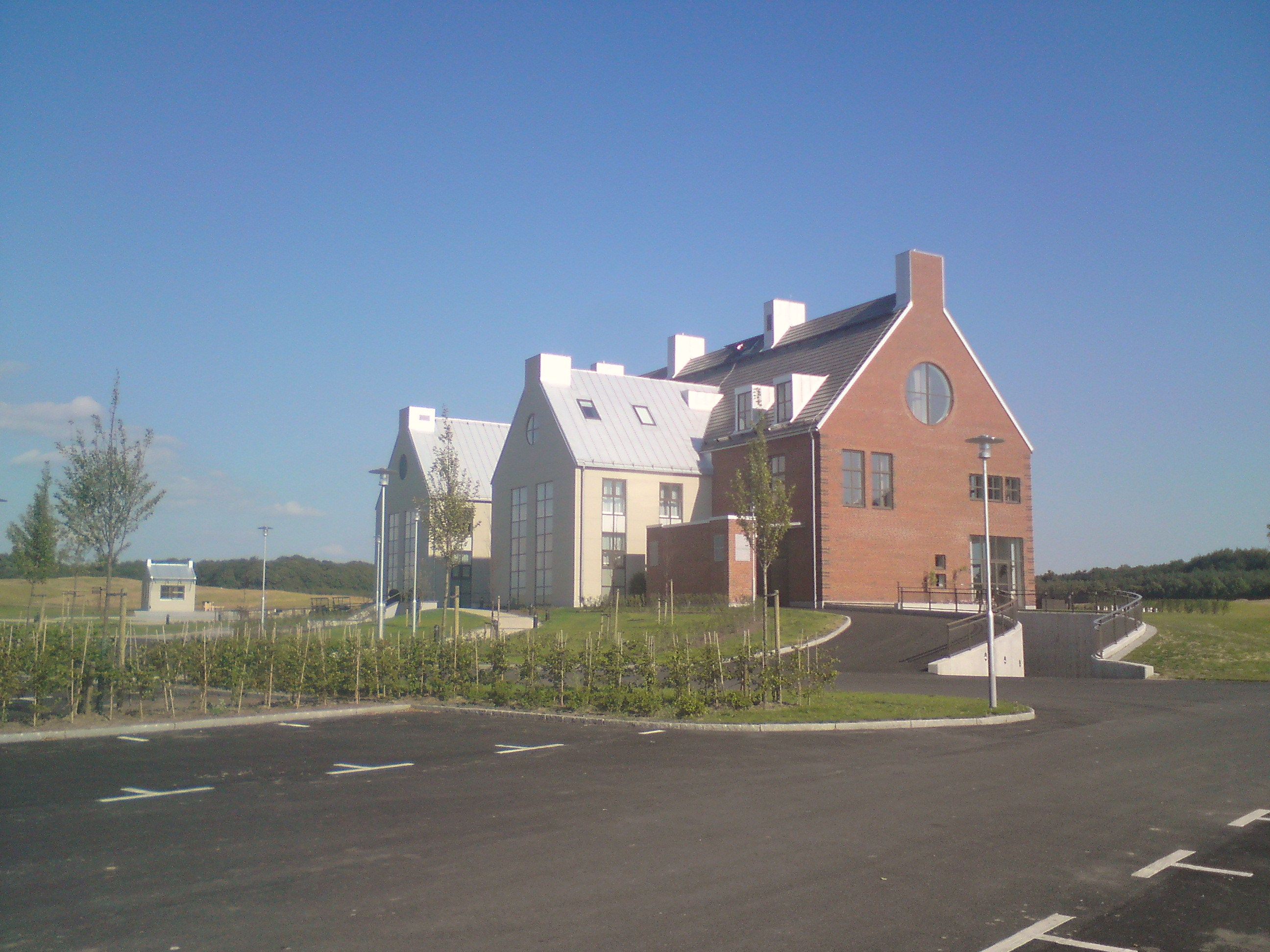 Klubbhus till PGA Sweden National:s banor utanför Bara.